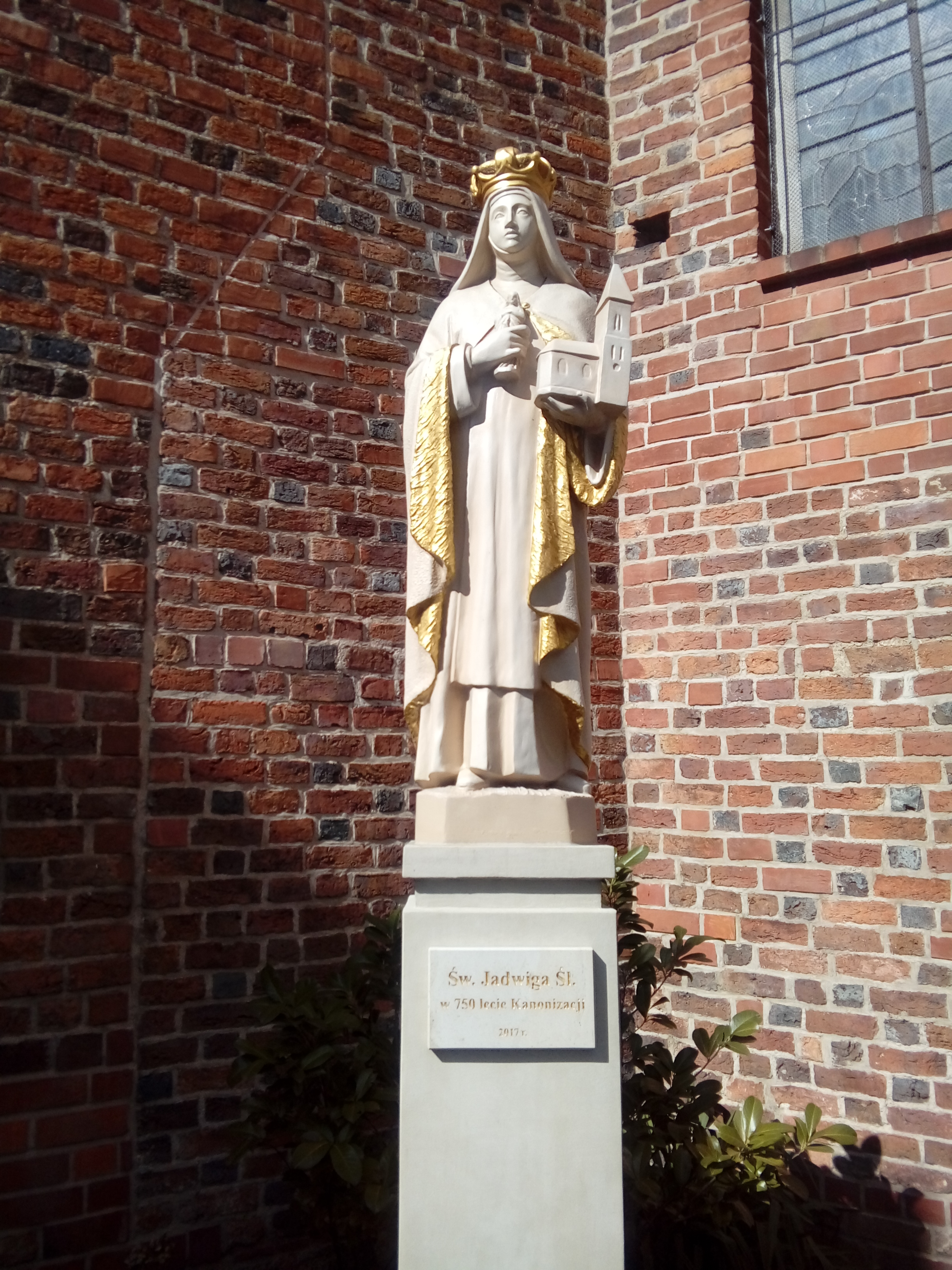 Pomnik św. Jadwigi Śląskiej przy zielonogórskiej konkatedrze